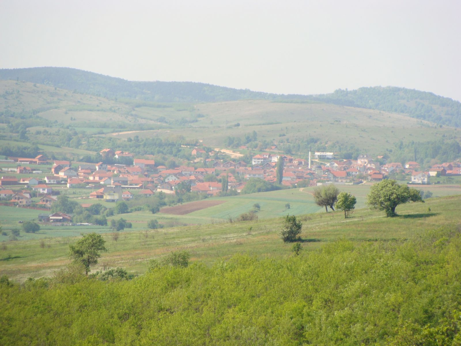 Sumulicë Pamje Nasalca